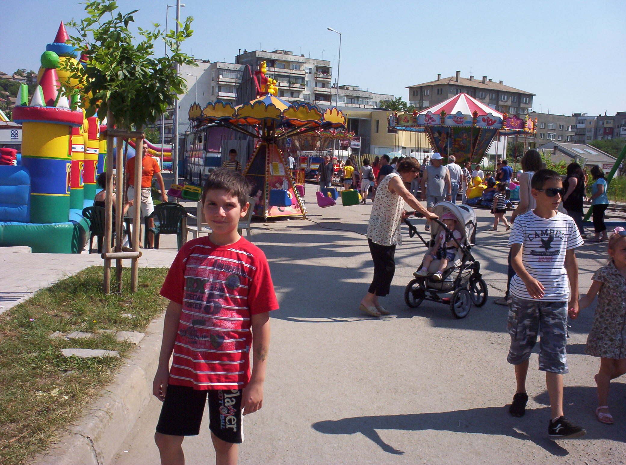 Панаирът в гр. Попово, 2011 г.